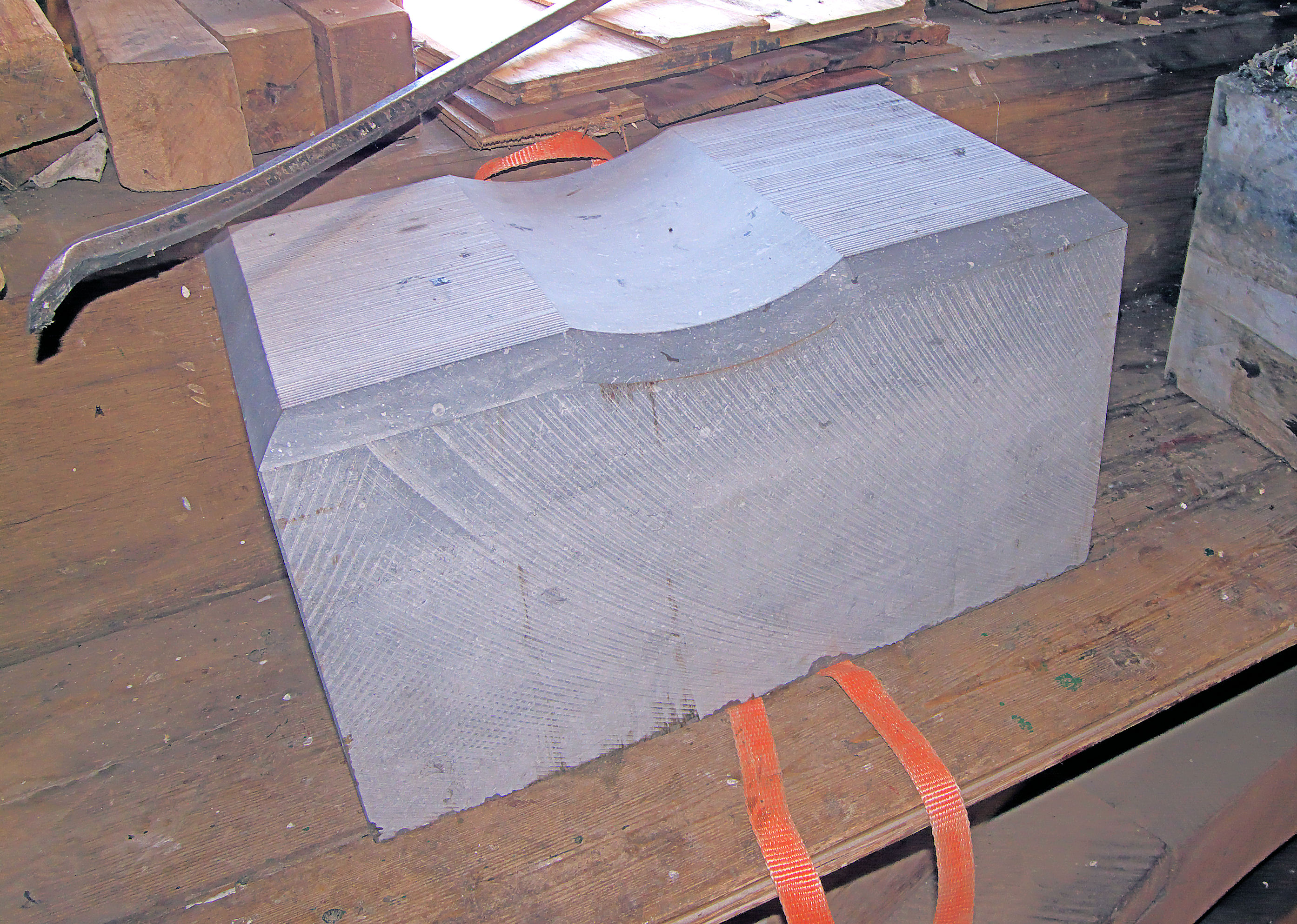 De Hoop, Garderen, nieuwe arduinen halssteen